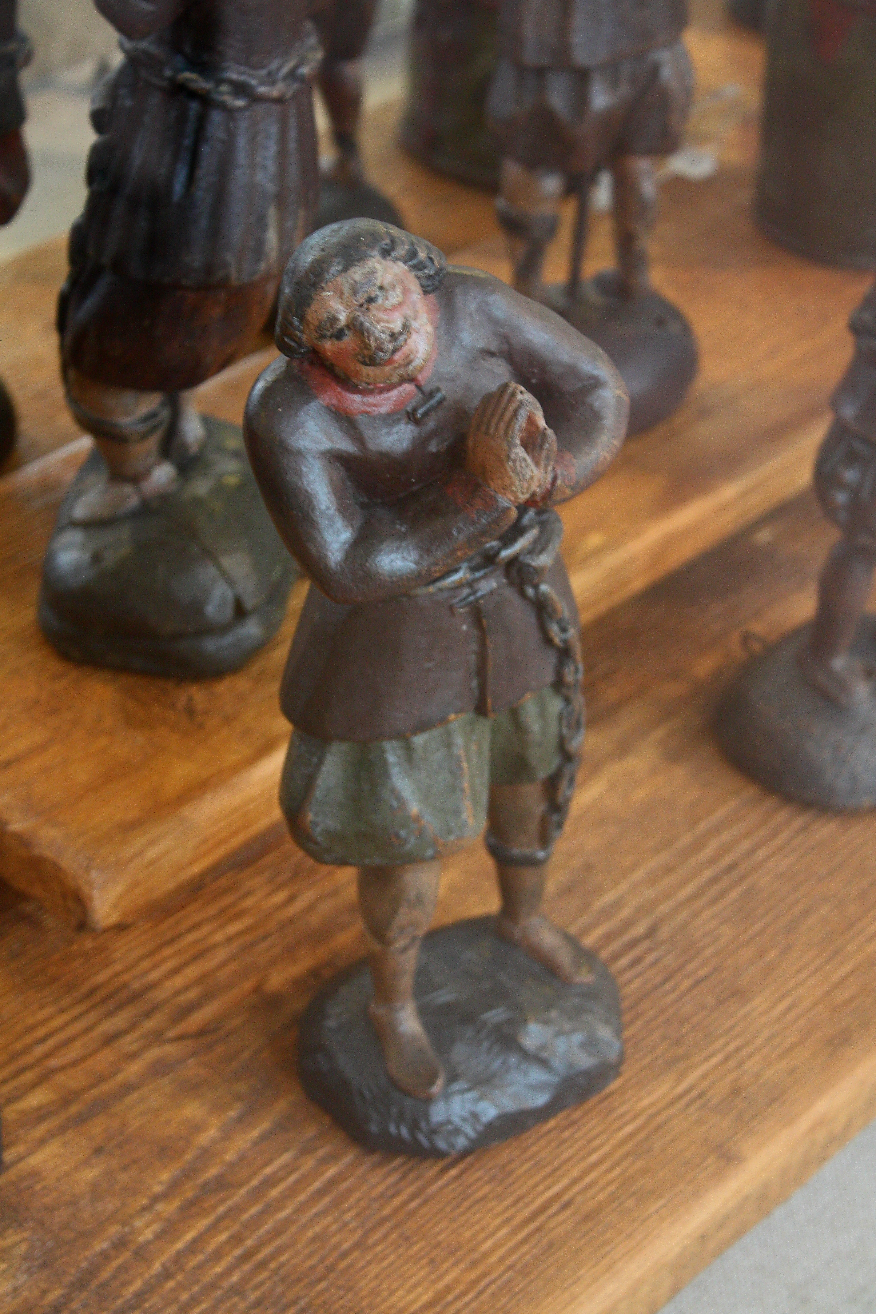 Das Foto zeigt eine sogenannte Sklavenfigur aus der Zeit der Hamburgischen Konvoischiffahrt (17./18. Jahrhundert). Die Figuren sollten zur Spendenbereitschaft der Bürger beitragen und an das Schicksal versklavter Hamburger Seeleute erinnern